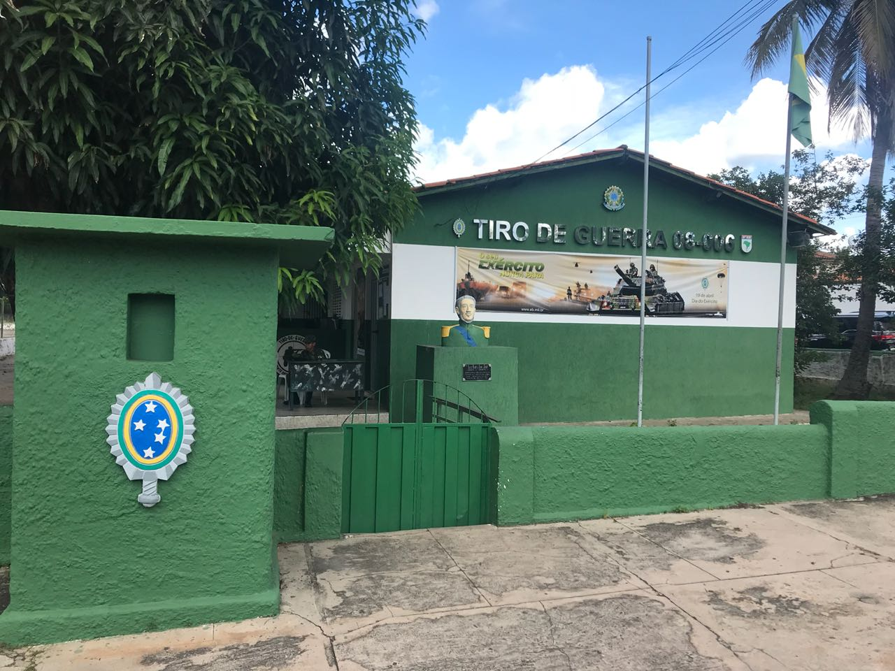 Tiro de Guerra de Caxias, no Maranhão.